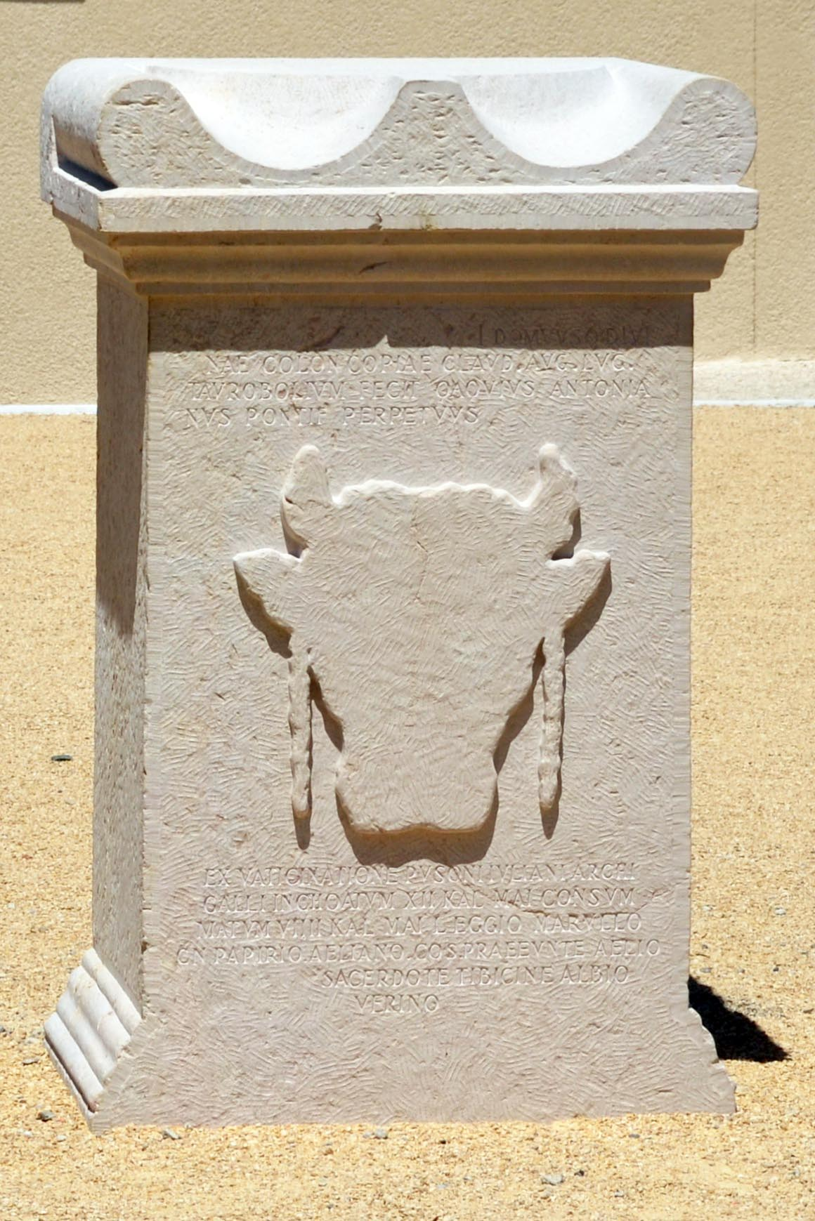 Copie moderne de l’autel taurobolique de Tain-l’Hermitage (Drôme), place du Taurobole.